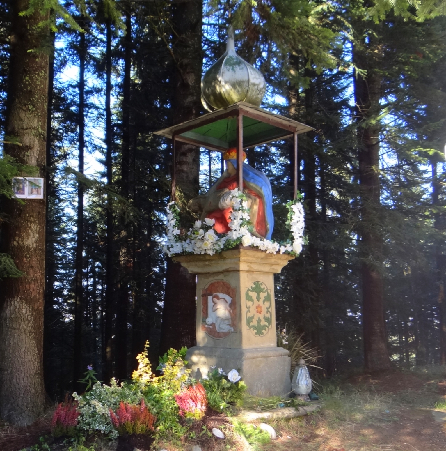 Pieta na osiedlu Danielki w Podwilku